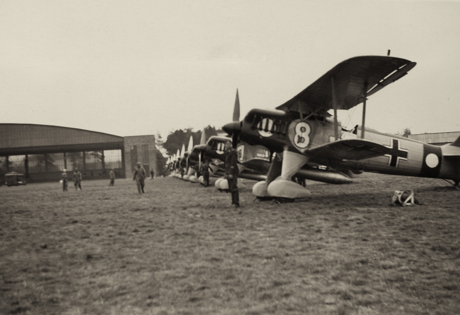 Heinkel He-51 des Jagdgeschwaders "Richthofen"